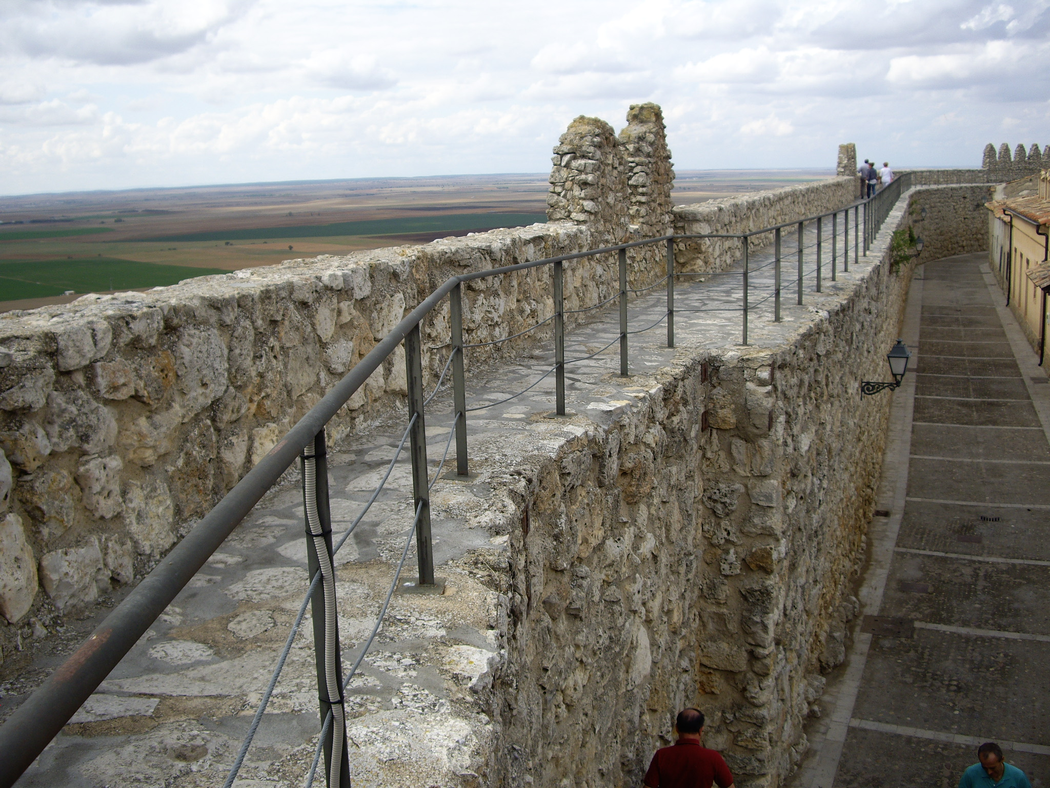 Urueñako harresia